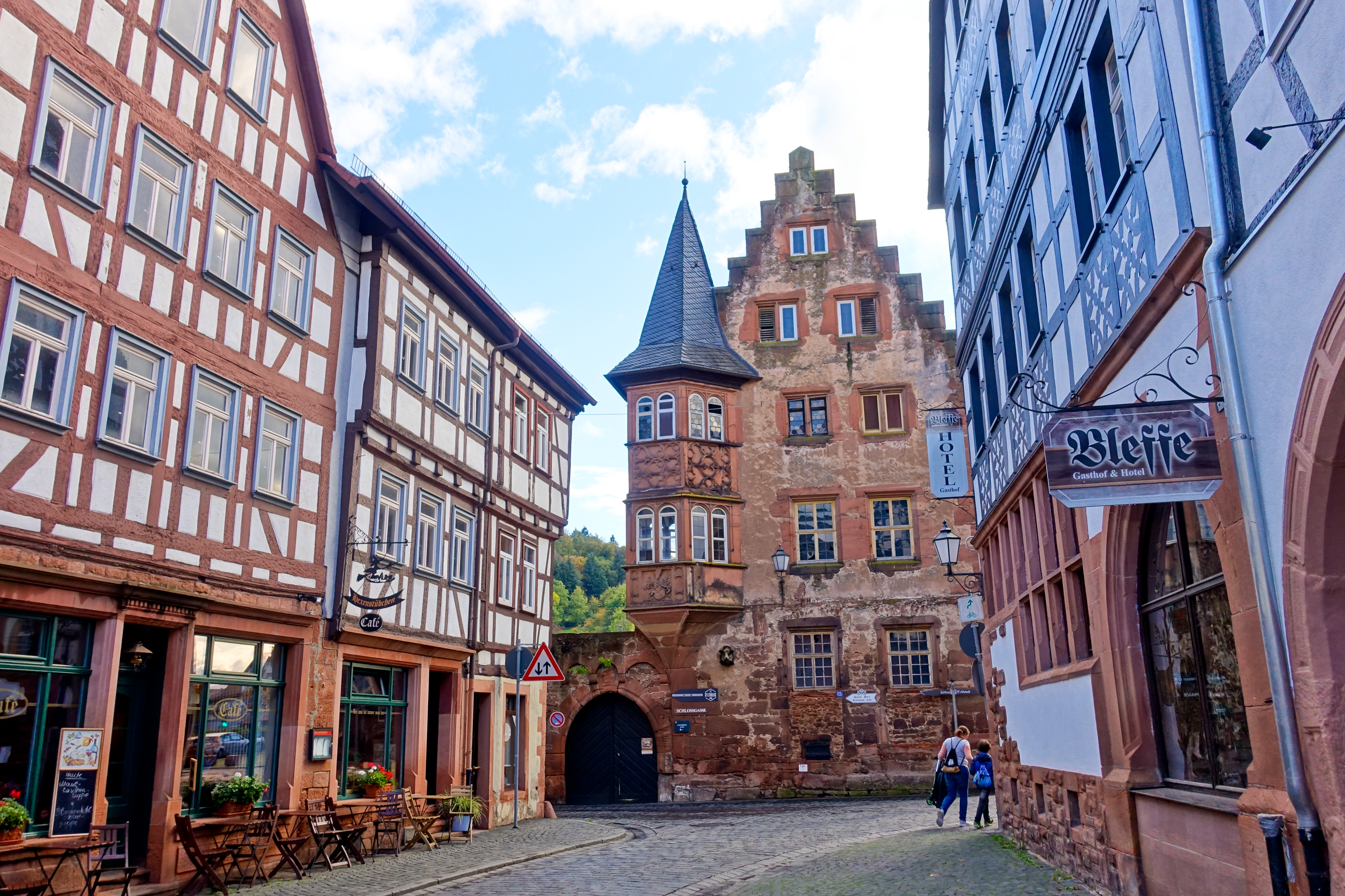 Büdingen: Blick nach Süden von der Straße Altstadt auf das „Steinerne Haus“